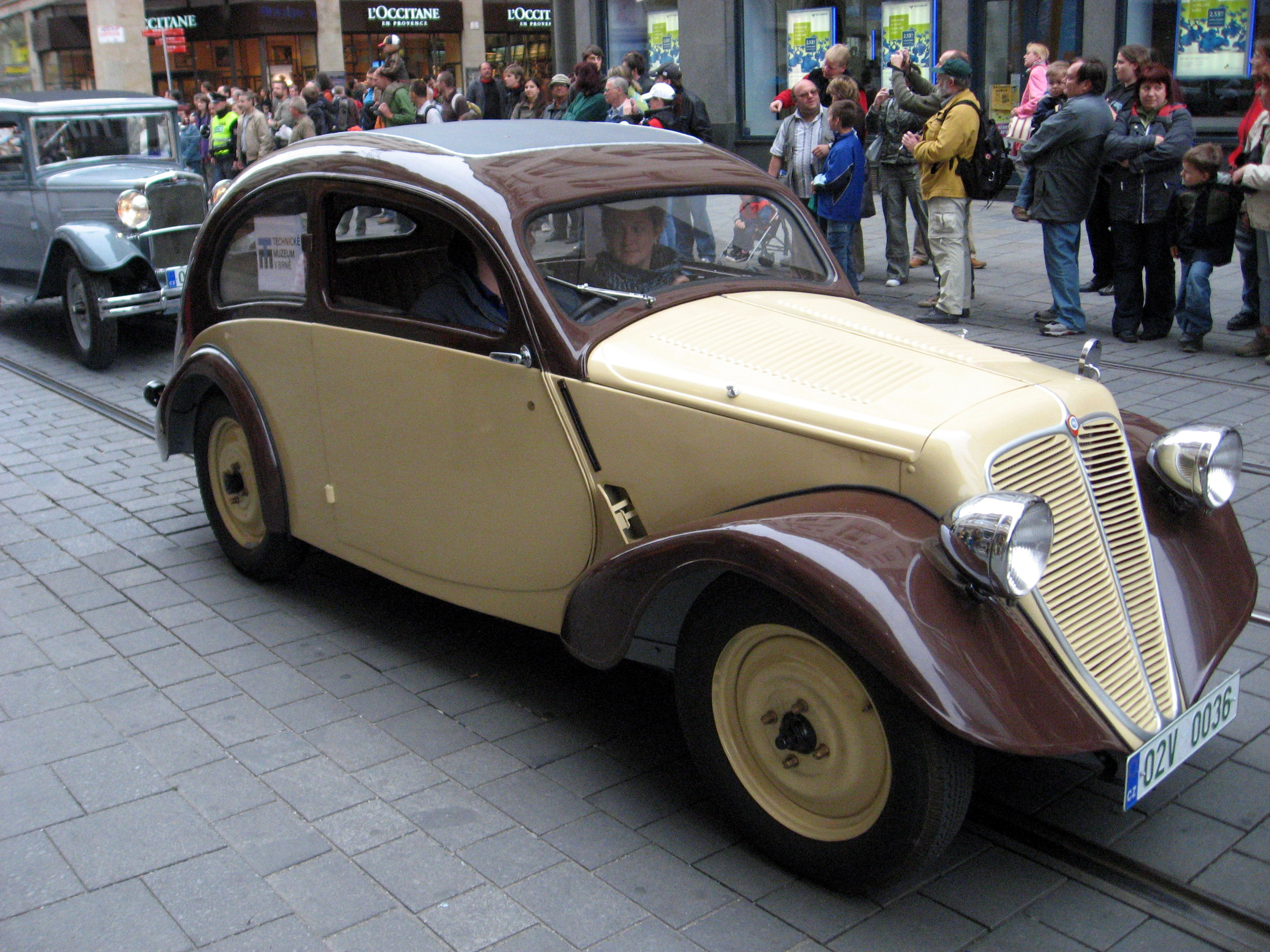 Historický automobil v centru Brna Z6 (1935/36) ("Hurvinek"), 0,7-l-engine, two cylinders, two stroke, 19 hp, front-wheel drive, ca. 500 cars built, ca. 13 are still existing